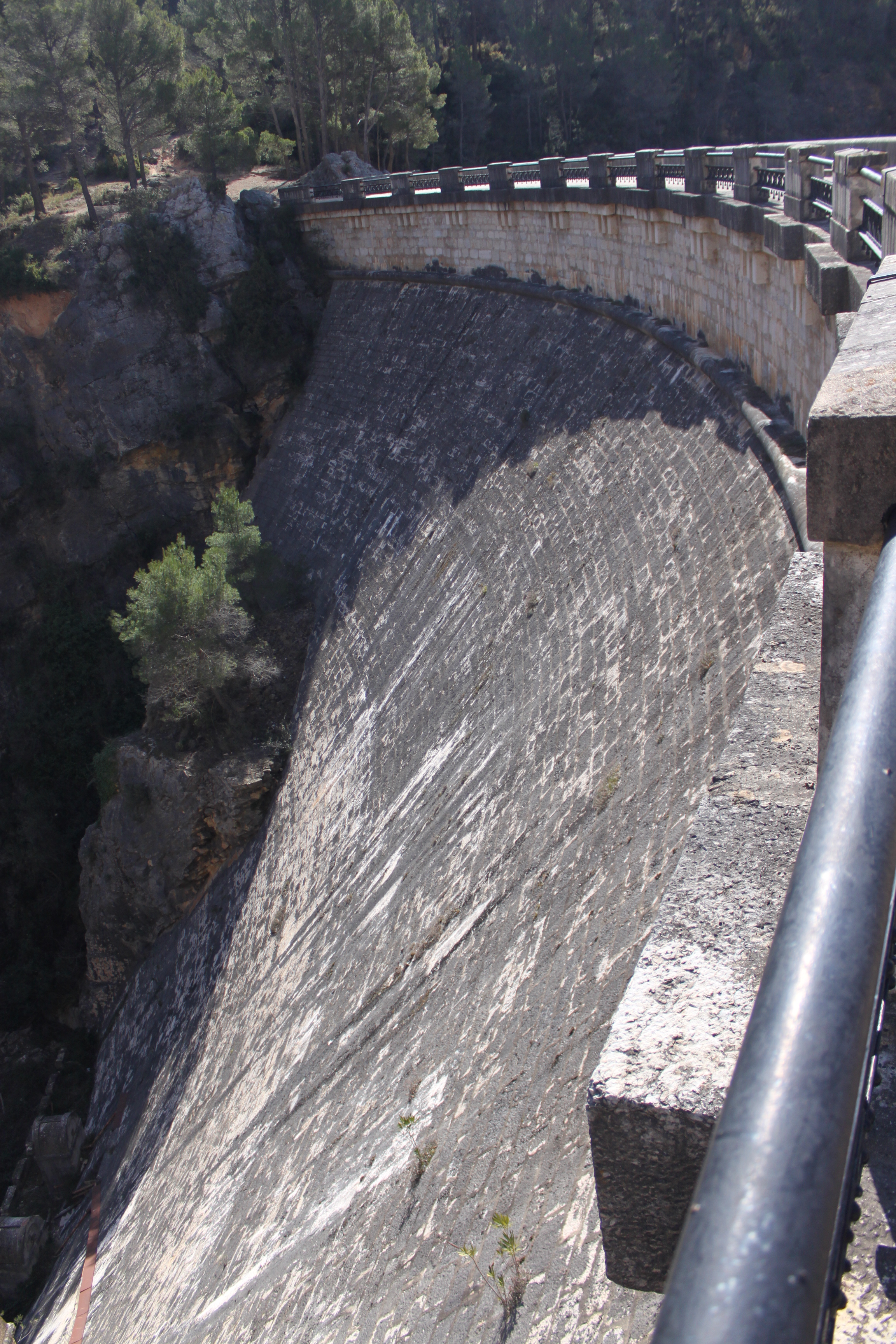 Presa del embalse de Buseo, en Chera, provincia de Valencia, Comunidad valenciana, España